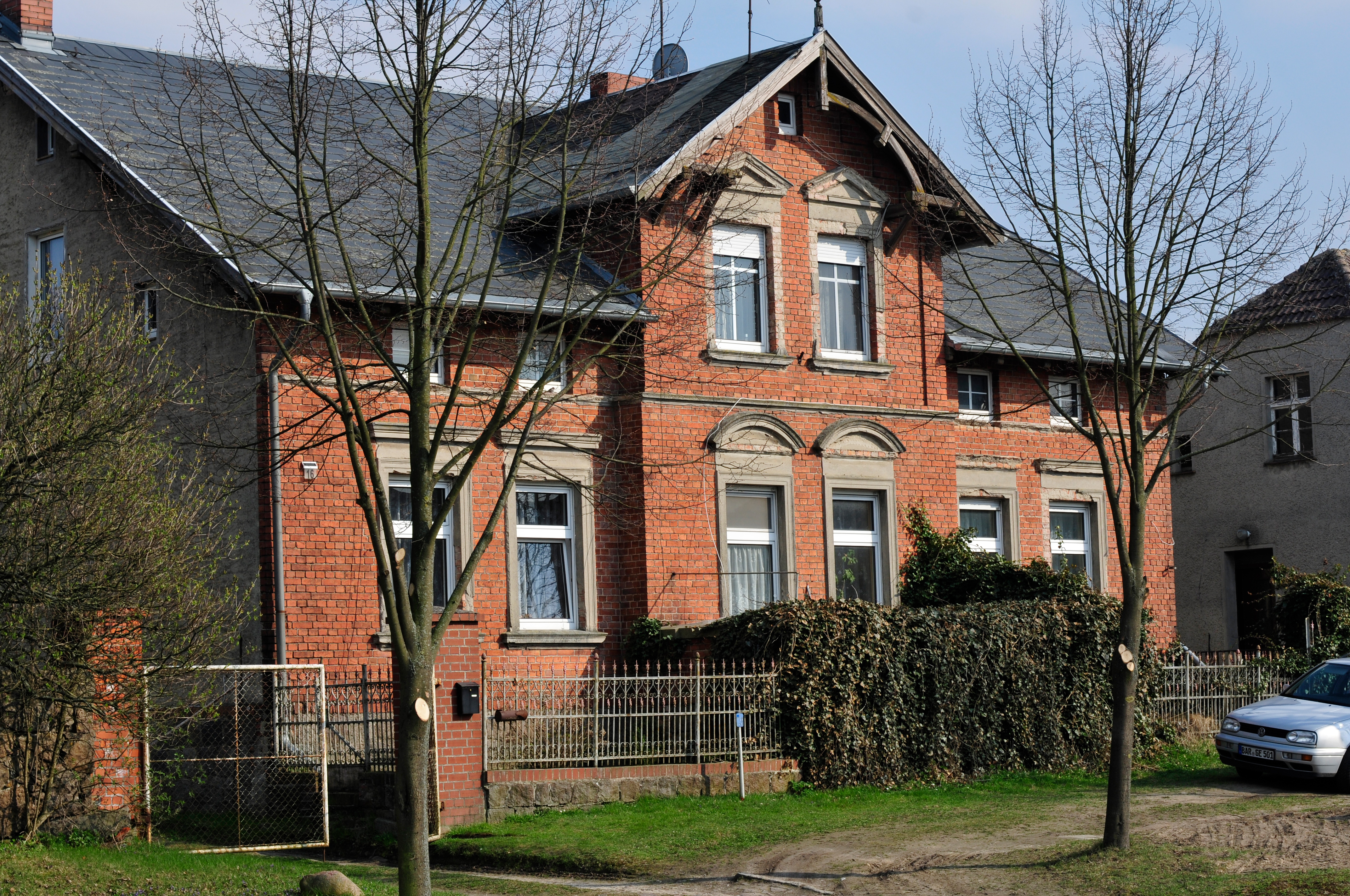 Parsteinsee Kreis Barnim